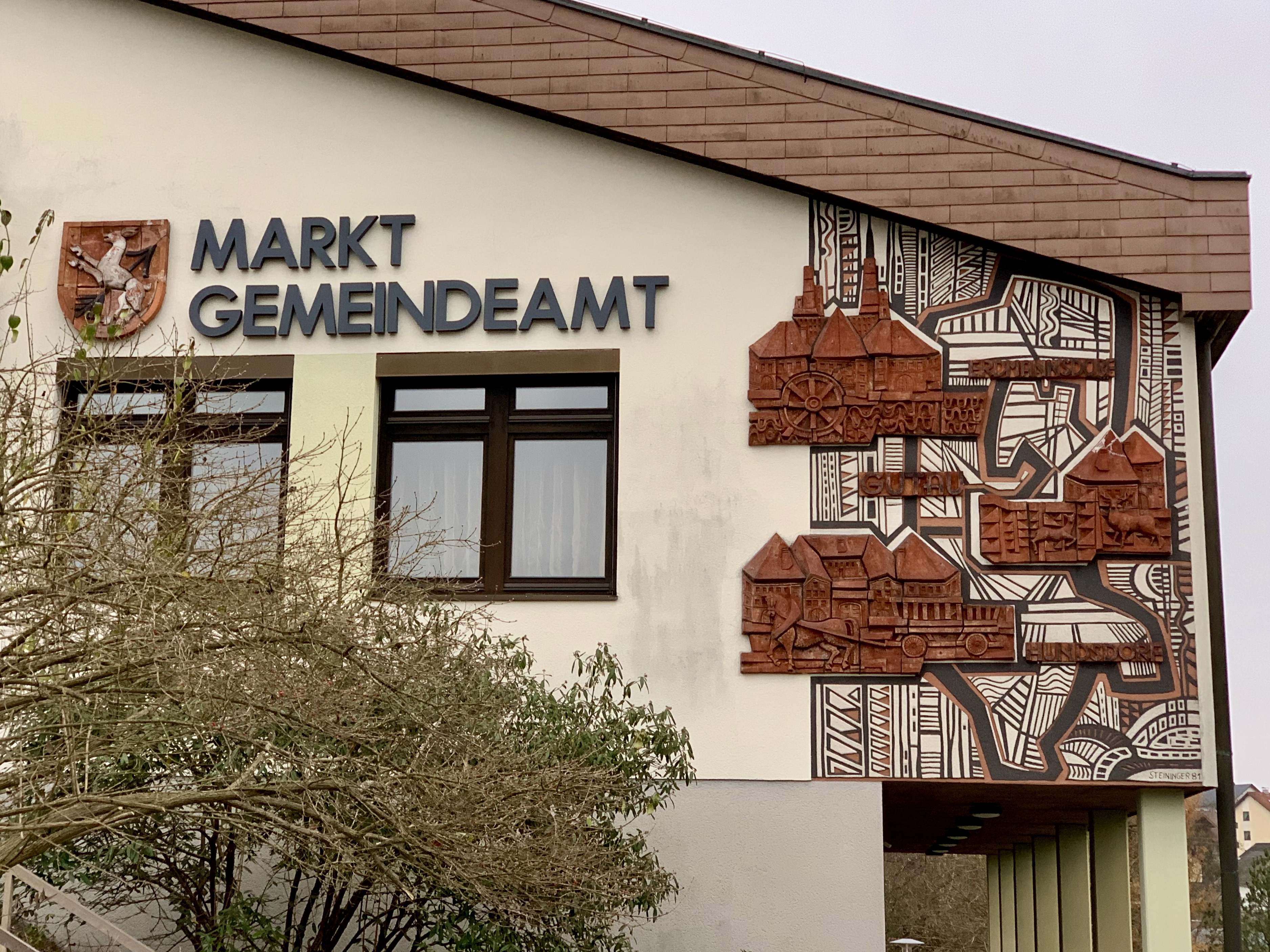 Sgraffito von Ingrid Steininger im Rahmen von Kunst am Bau, Gemeindeamt Gutau